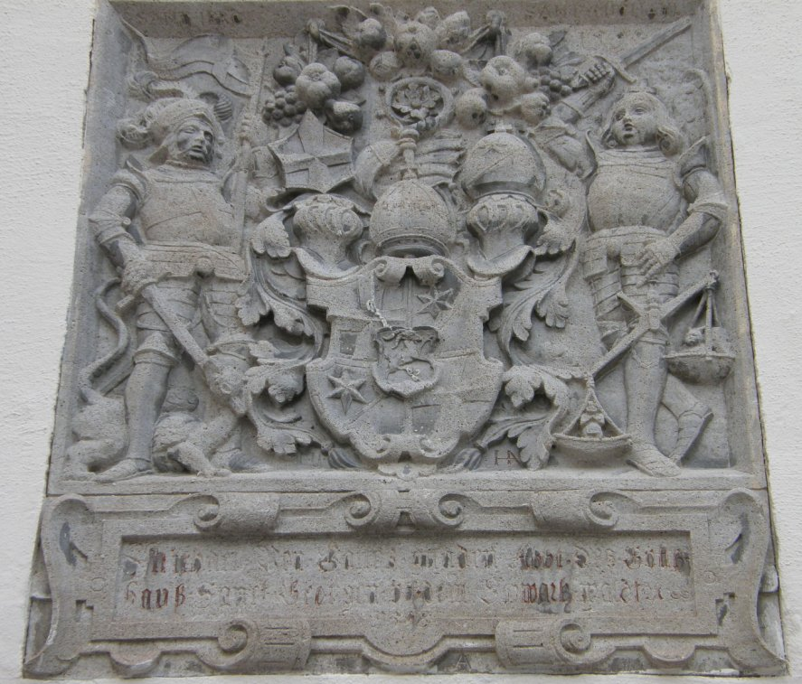 Wappentafel von Abt Gaißer, Hans Amann, 1598, Alte Prälatur in Villingen.